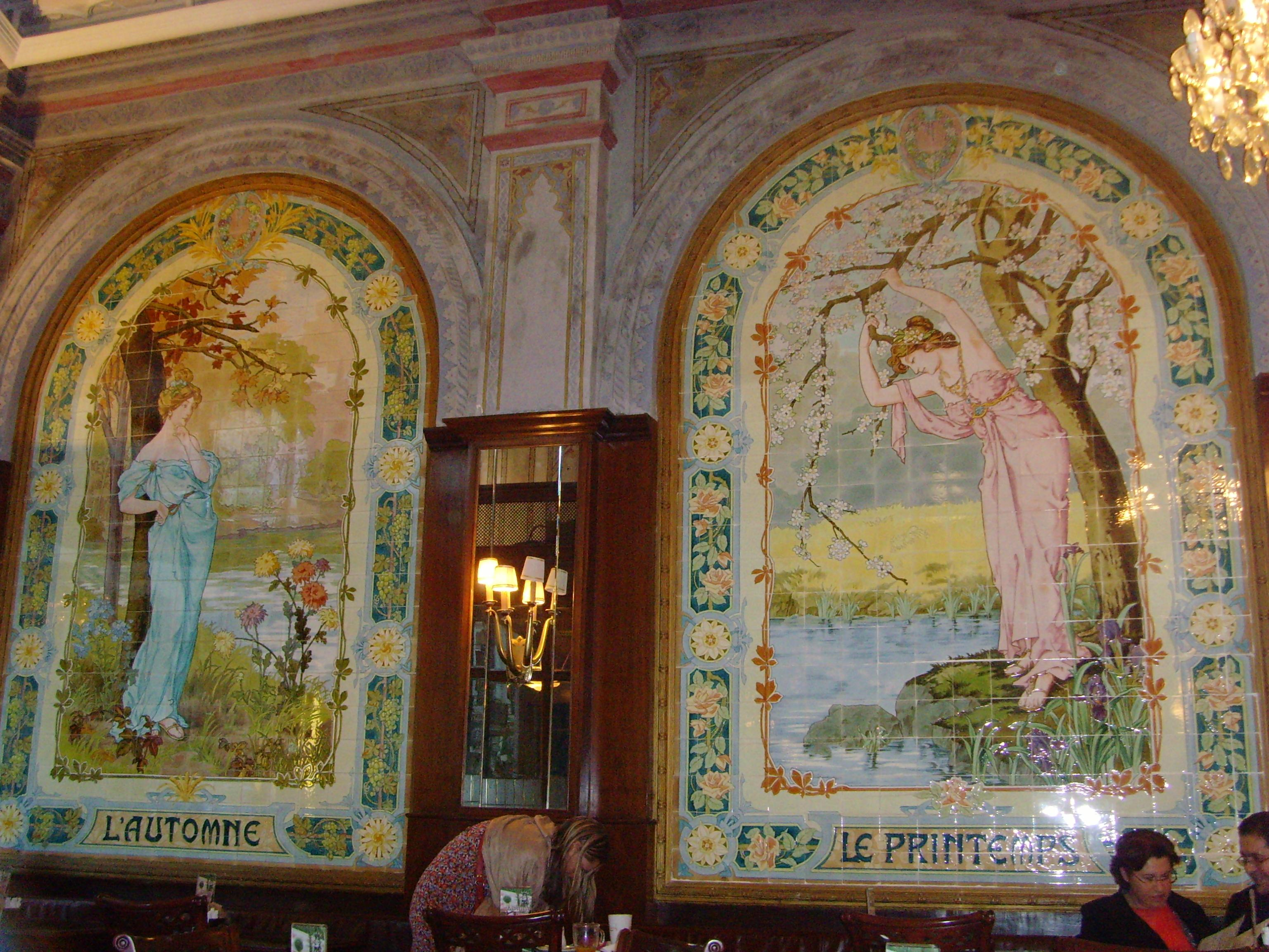 İstiklal Caddesi'ndeki Markiz Pastanesi'nin içi / Interior of Cafe Merkiz on İstiklal Avenue